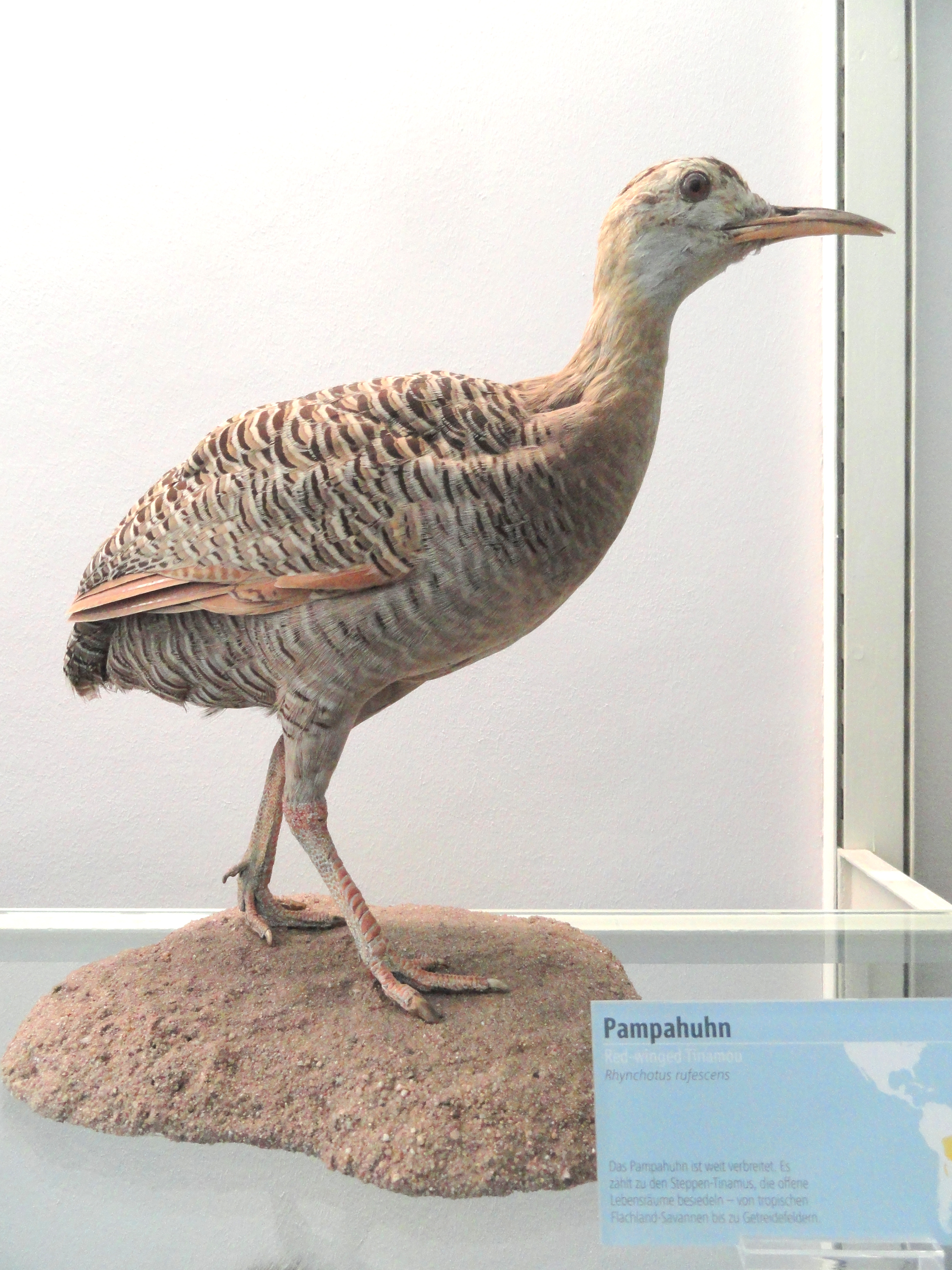 Exhibit in Naturmuseum Senckenberg, Frankfurt am Main, Germany.